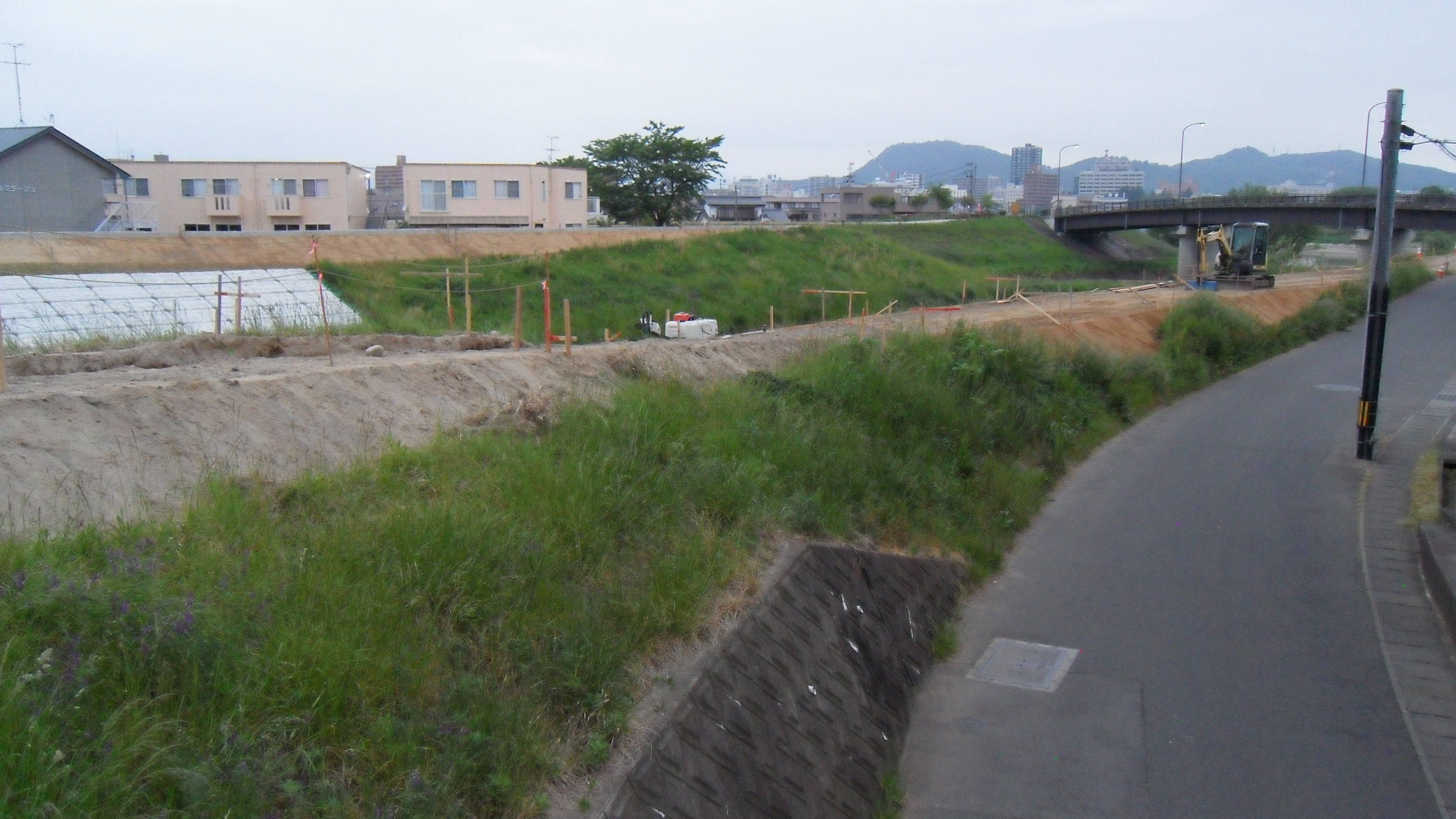 工事中の濁川橋と鳥谷野橋の間. 濁川橋右岸側から撮影.